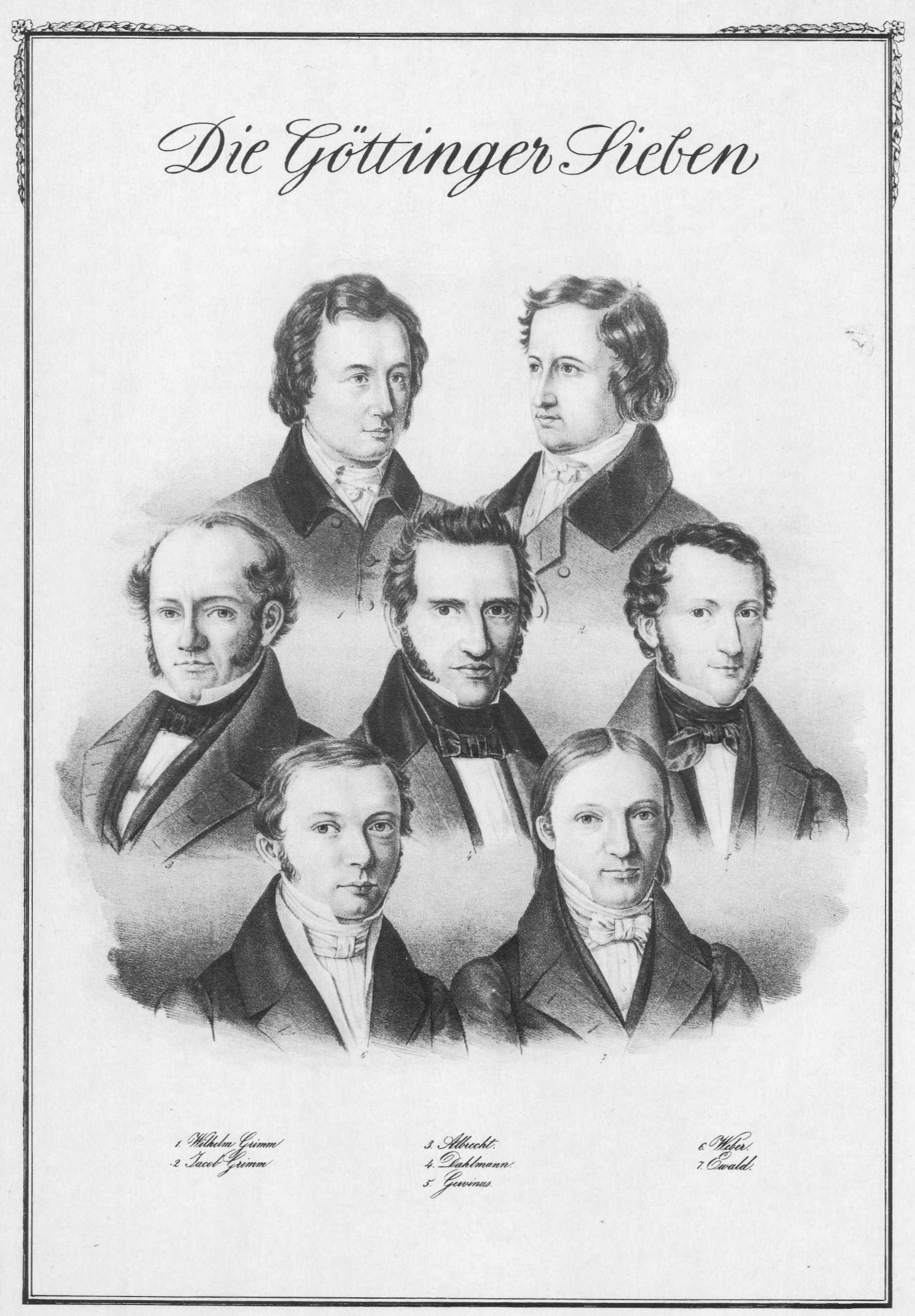 Die Göttinger Sieben, Lithographie von Eduard Ritmüller, 1837/1838, Niedersächsische Staats- und Universitätsbiliothek Göttingen. Wilhelm Grimm Jacob Grimm Wilhelm Eduard Albrecht Friedrich Christoph Dahlmann Georg Gottfried Gervinus Wilhelm Eduard Weber Heinrich Georg August Ewald